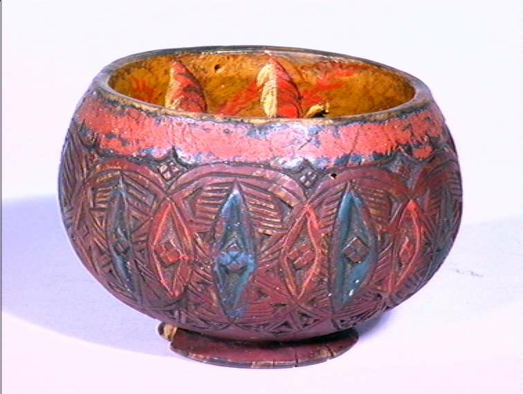 Einskilsbolle fra Fyresdal i Telemark med skåret datering 1705(?), høyde 8 cm. Foto: Anne-Lise Reinsfelt, Norsk Folkemuseum, NF.1897-1038.